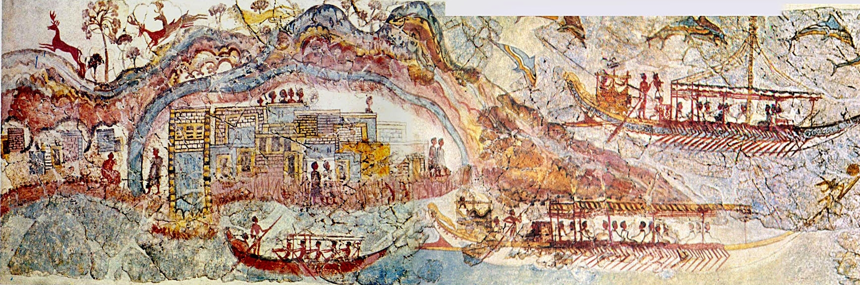 Schiffsfresko aus Raum 5 im Obergeschoss des Westhauses der Ausgrabungsstätte in Akrotiri auf Santorin, Kykladen, Griechenland